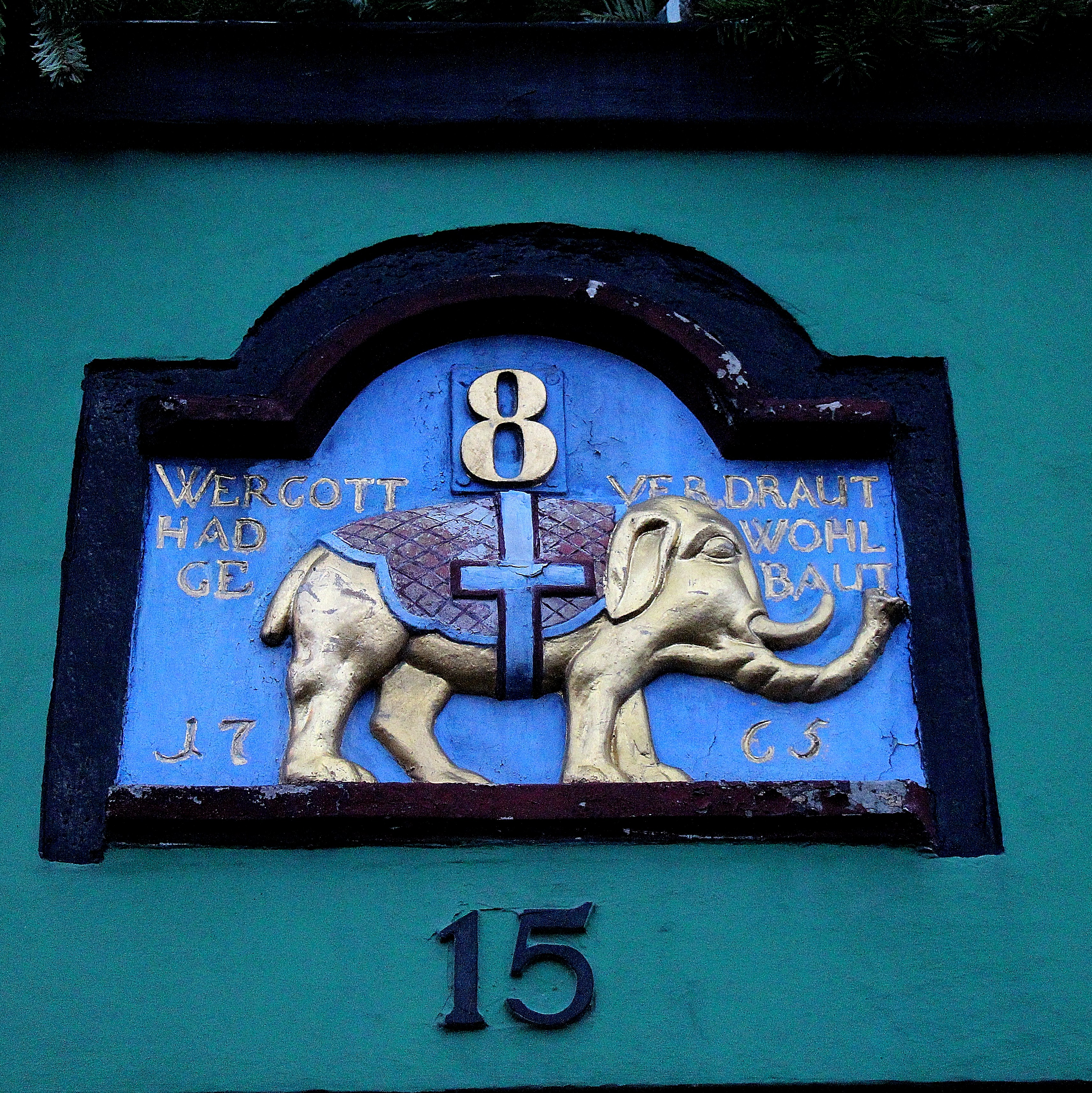 Sign on Nyhavn 15 in Copenhagen, Denmark